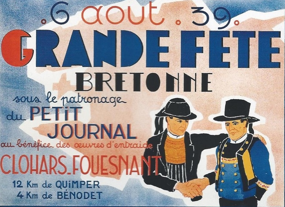 Clohars-Fouesnant : affiche de la grande fête bretonne du 6 août 1939 (un Bigouden et un Glazik